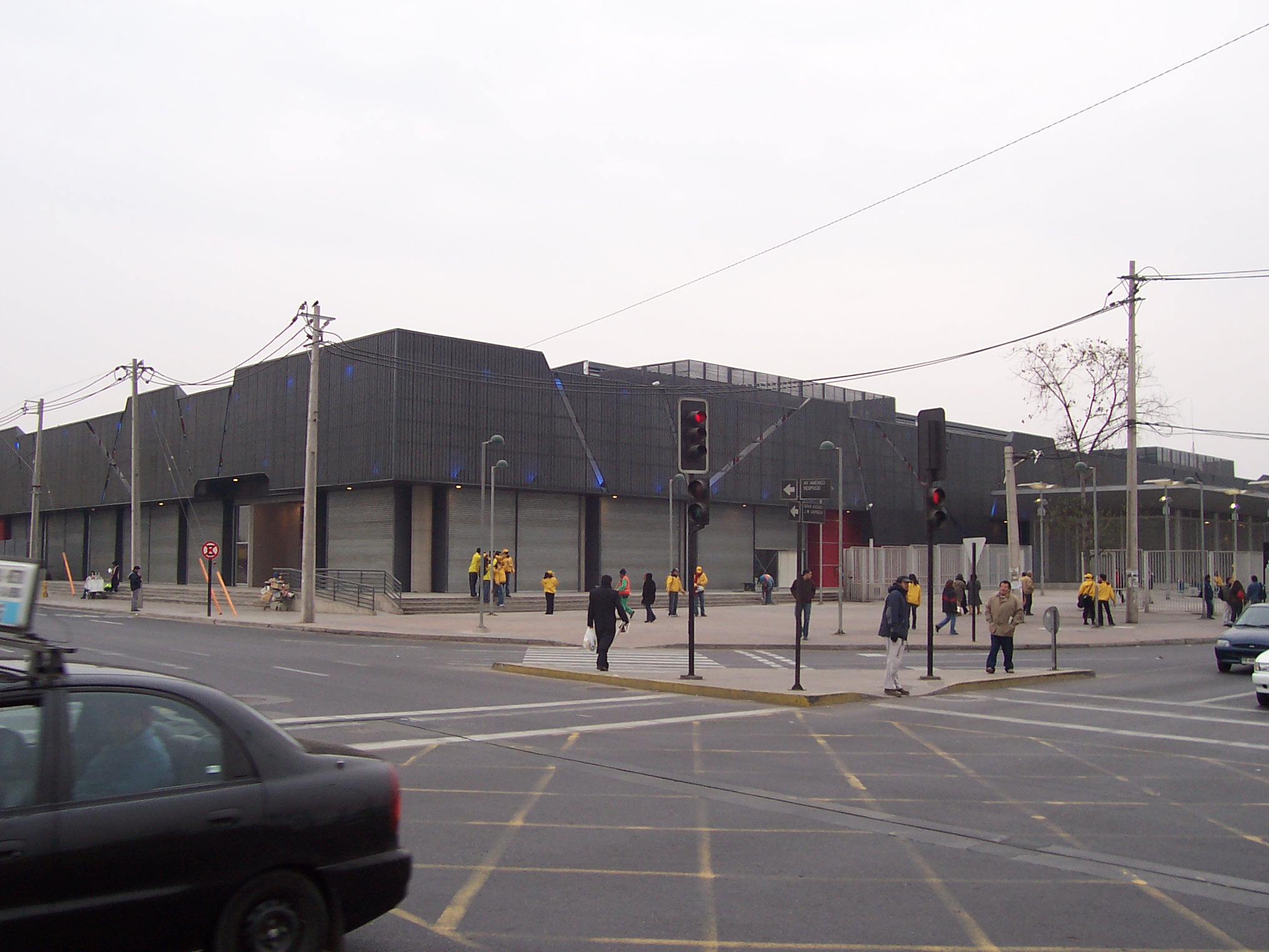 Frontis Estacion Intermodal Gabriela Mistral